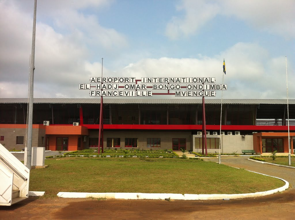 Terminal de l'aeroport